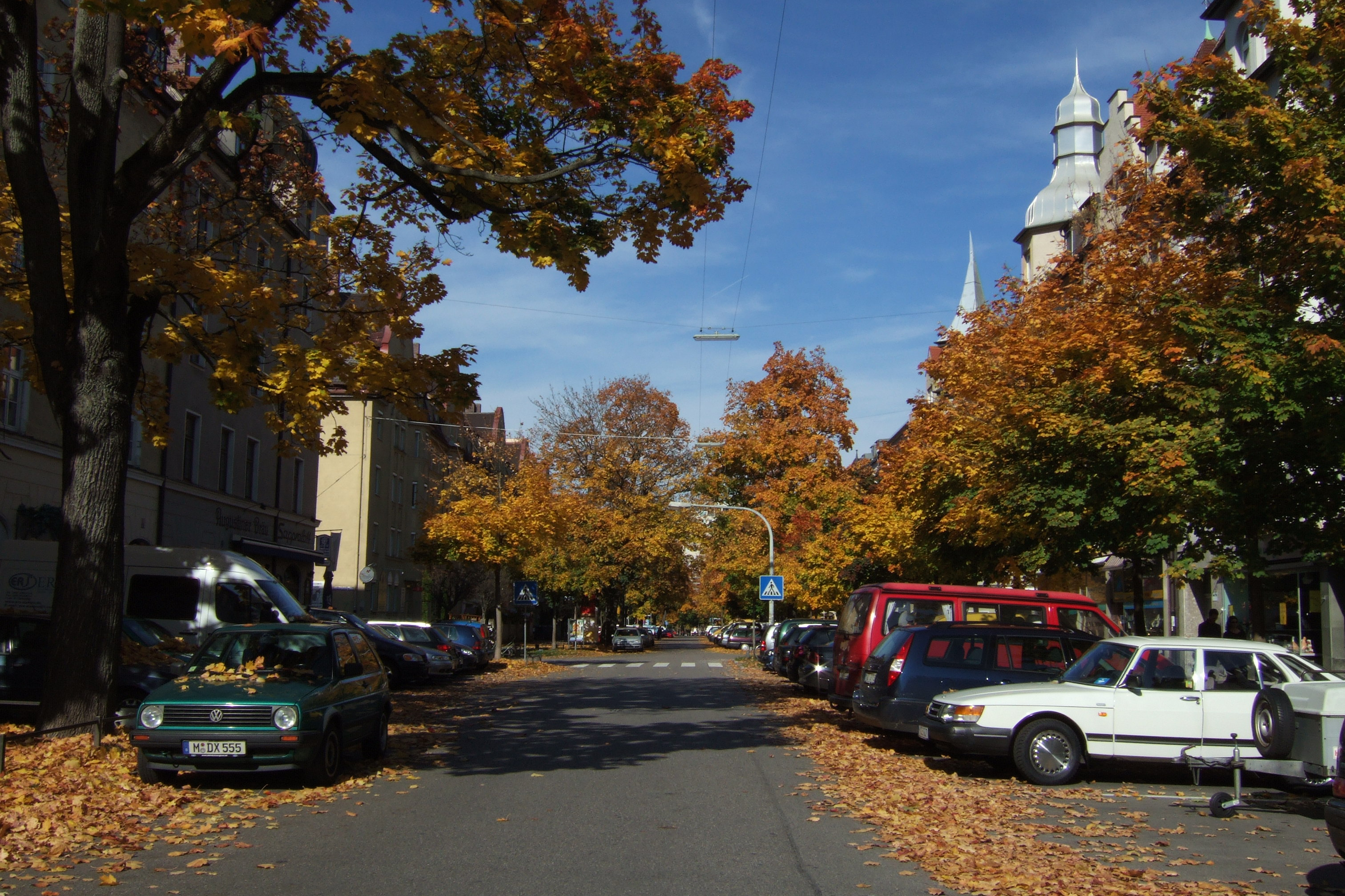 Die Donnersbergerstraße in München gesehen von Süd nach Nord auf Höhe der Wilderich-Lang-Straße